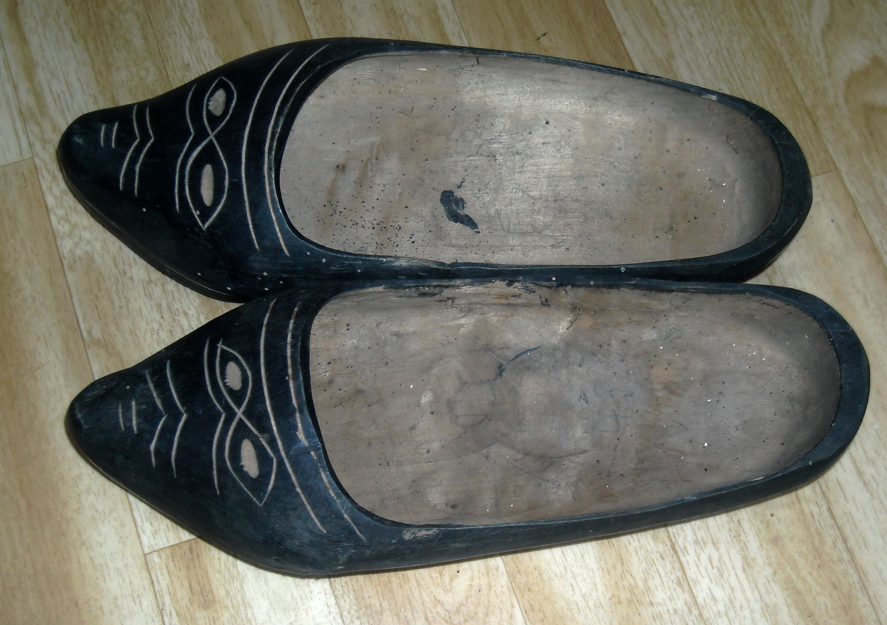 Clogs from Belgium - musée du sabot de Porcheresse (Ardenne)